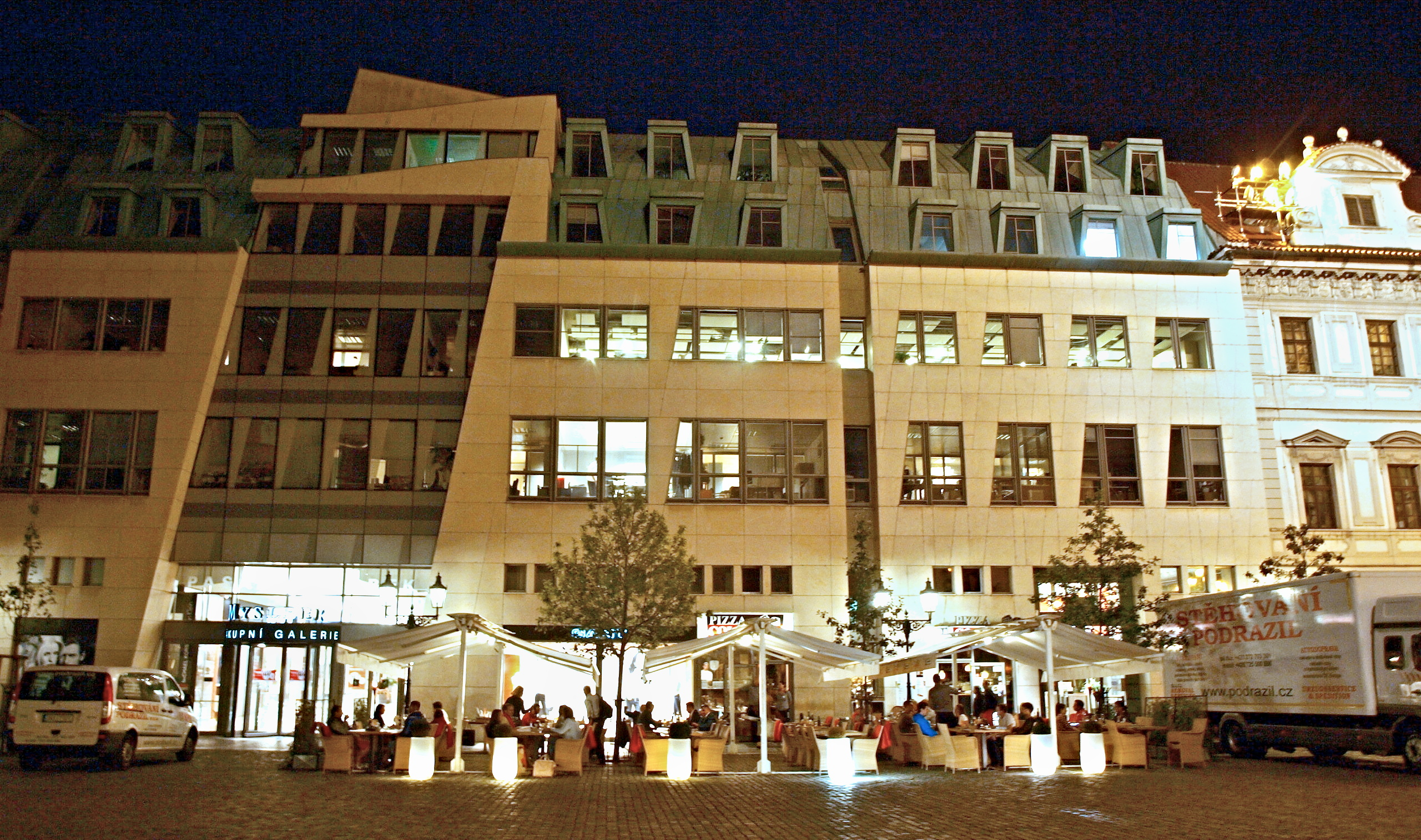 Palác Myslbek Praha